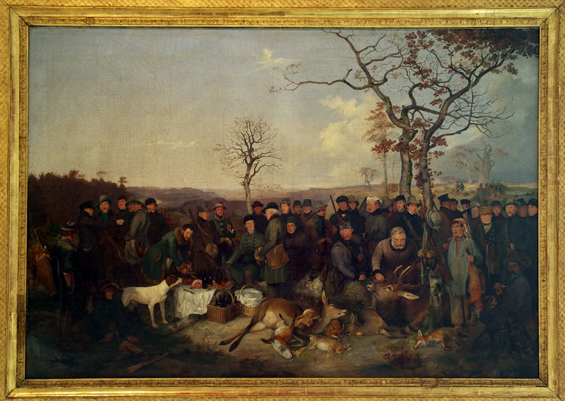 Friedrich Anton Wyttenbach: Trierer Jagdgesellschaft, 1845, Öl auf Leinwand, 95 x 197 cm, Stadtmuseum Simeonstift Trier, Inv. Nr. III 66